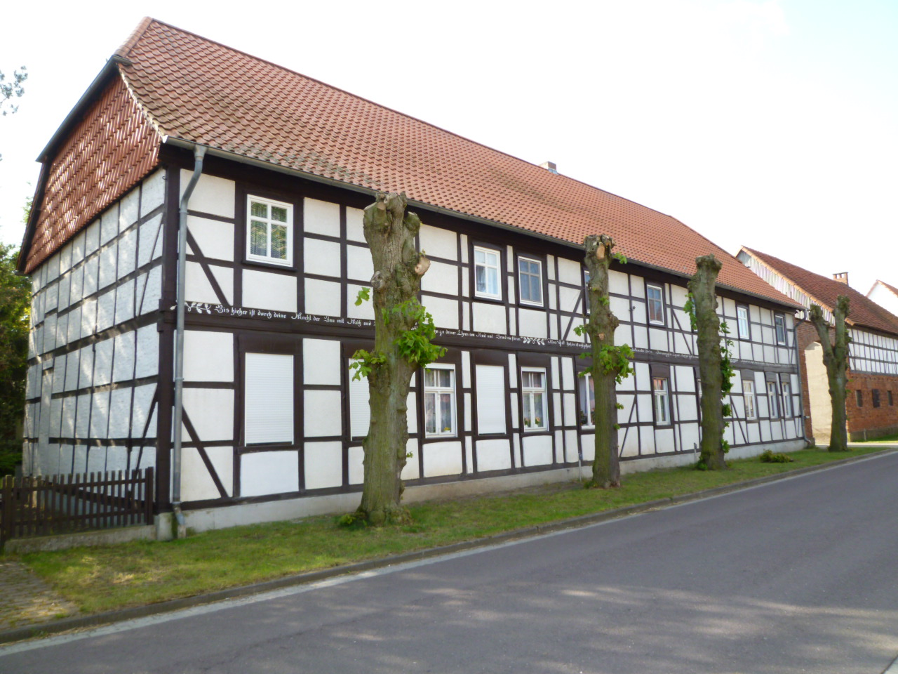 Calvörde-Lössewitz, 17.05.2012, denkmalgeschütztes Haus, Dorfstraße 8, Bild I von I